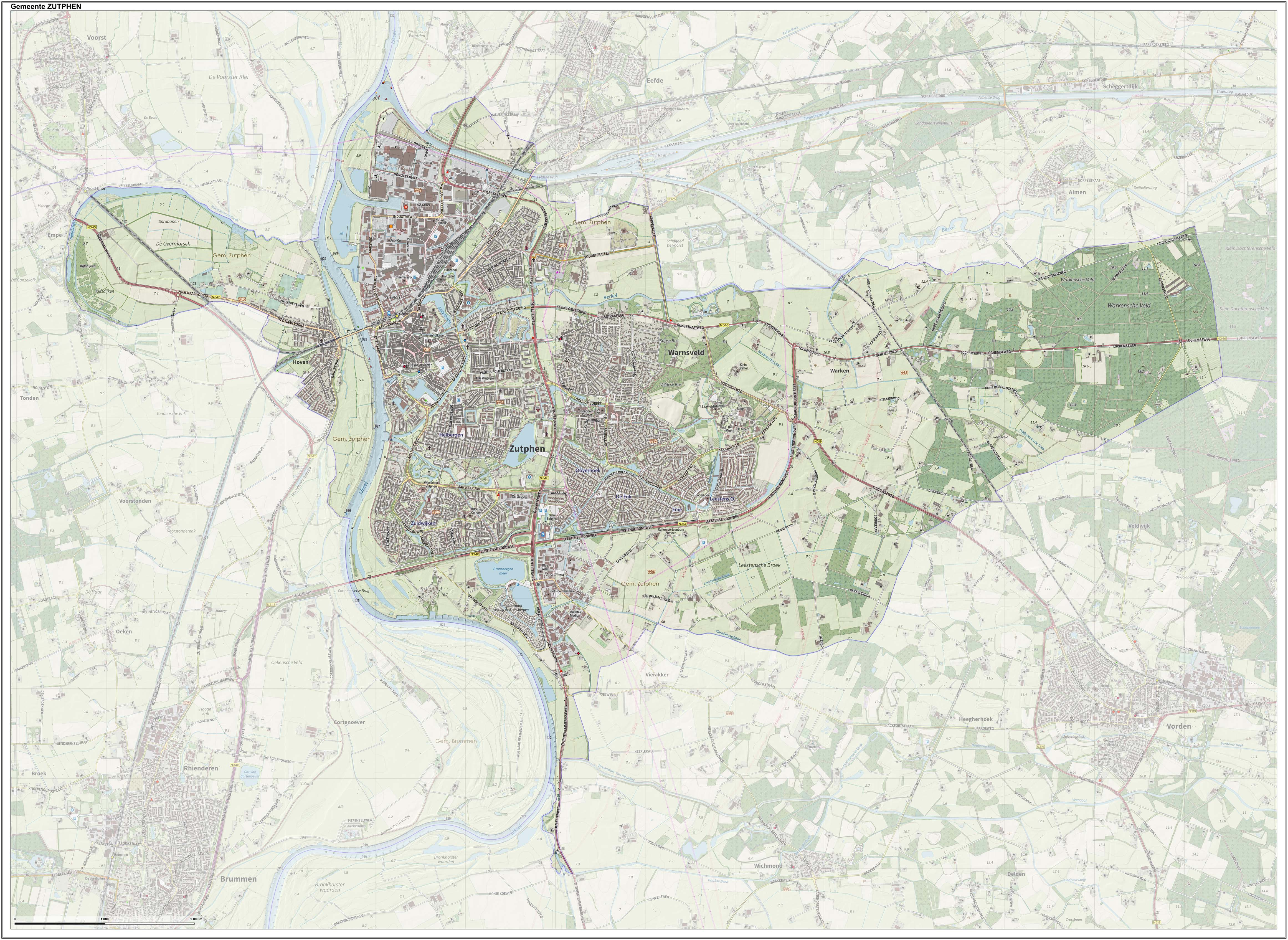 Topografische gemeentekaart. Resolutie: 400 pixels/km. Kaartbeeld samengesteld uit de open geodata van de Top10NL en Top25namen (Kadaster), Creative Commons-BY licentie. Gebouwvlakken uit open geodata BAG extract. Wegen uit de OpenStreetMap, OpenStreetMap community. Reliëfschaduw uit de Actuele Hoogtekaart AHN2. Samenstelling en kleurenschema: Jan-Willem van Aalst, met QGIS. Zie ook de Legenda.